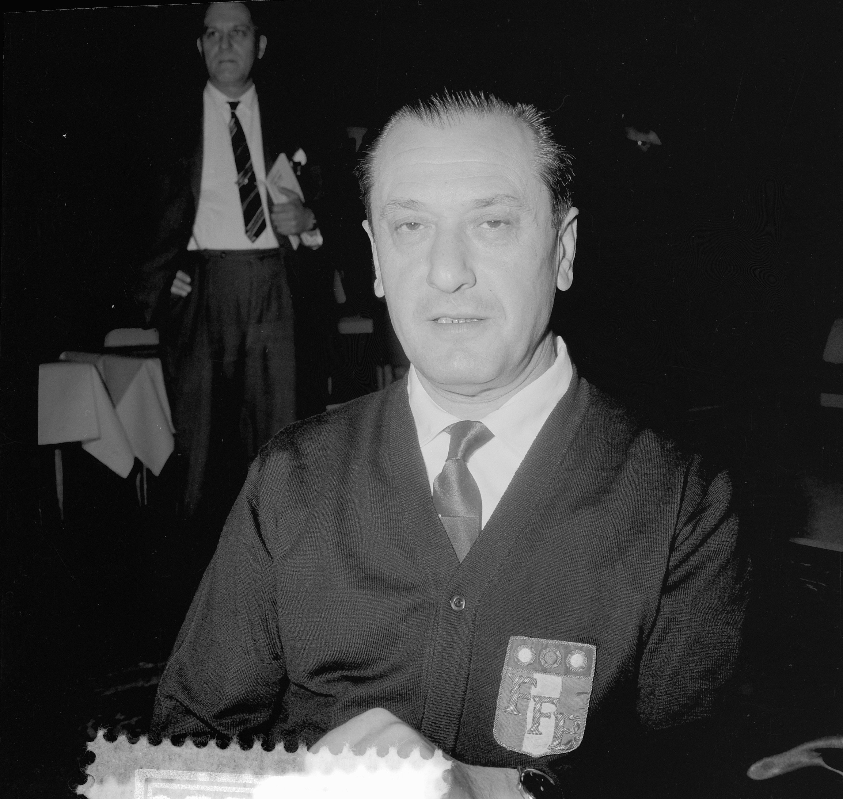 Collectie / Archief : Fotocollectie Anefo Reportage / Serie : [ onbekend ] Beschrijving : Kampioenschappen biljaren in Ostende, koppen Roger Hanoun (Frankrijk) Datum : 4 augustus 1964 Locatie : Frankrijk, Oostende Trefwoorden : KAMPIOENSCHAPPEN, biljarten Fotograaf : Koch, Eric / Anefo Auteursrechthebbende : Nationaal Archief Materiaalsoort : Negatief (zwart/wit) Nummer archiefinventaris : bekijk toegang 2.24.01.03 Bestanddeelnummer : 916-7226